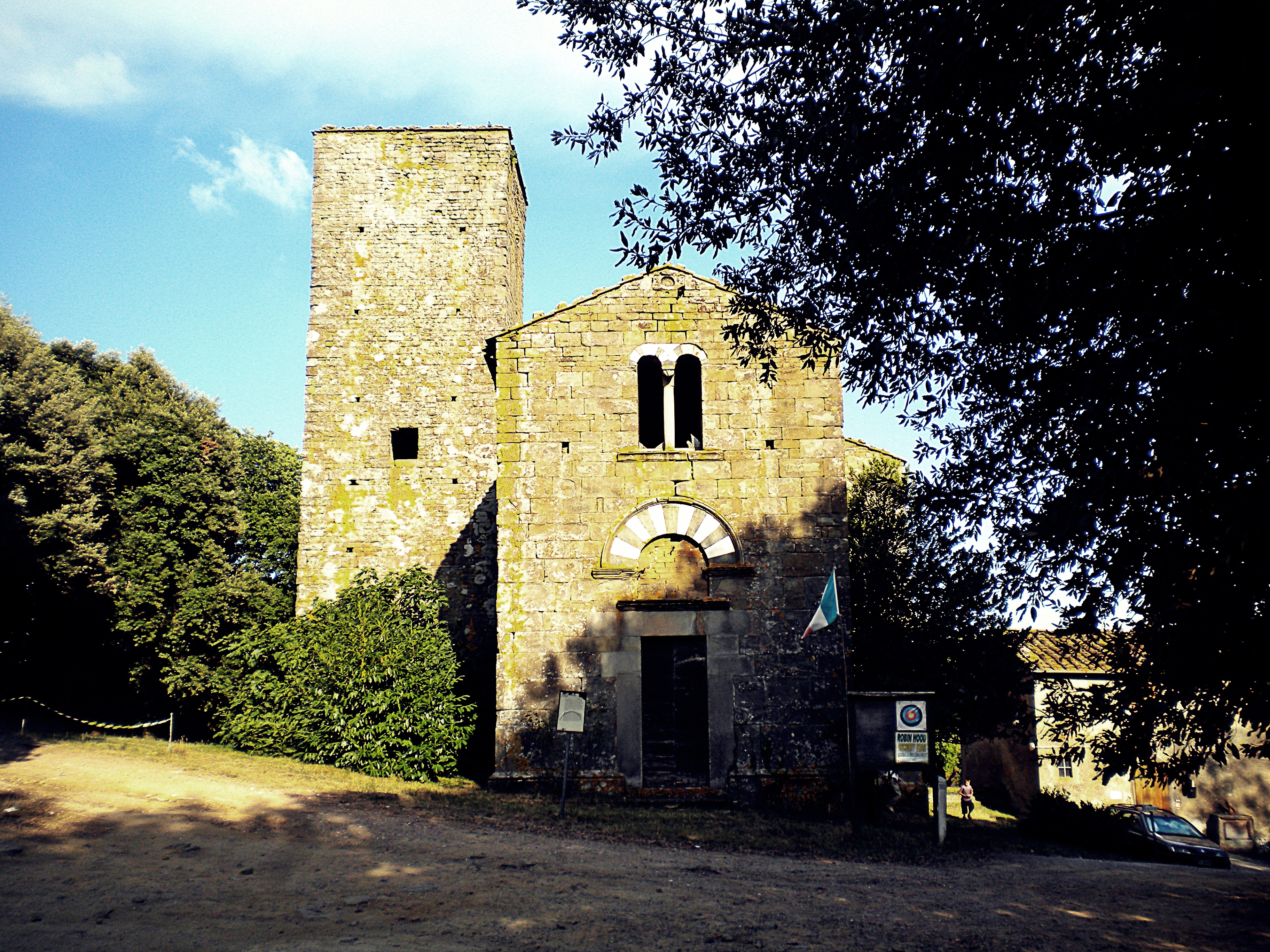 chiesaEmiliàn e rumagnòl: church